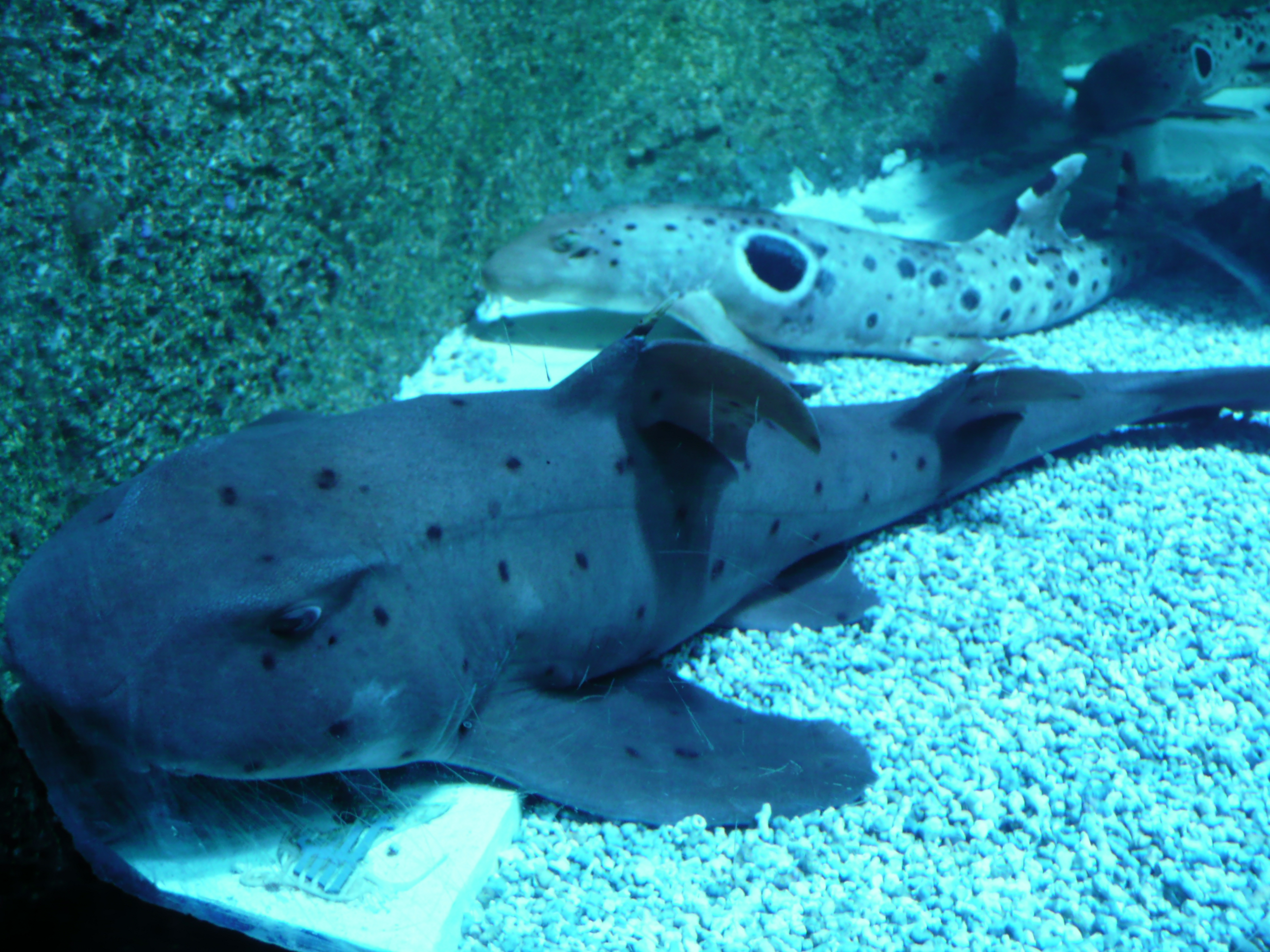 Heterodontus francisci in Aquarium tropical du Palais de la Porte Dorée